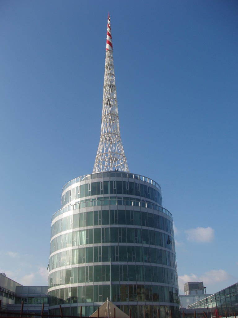 Messe Wien, Österreich, aufgenommen von mir, Stadler Peter, Benutzer:Gnosos, 08.03.2006